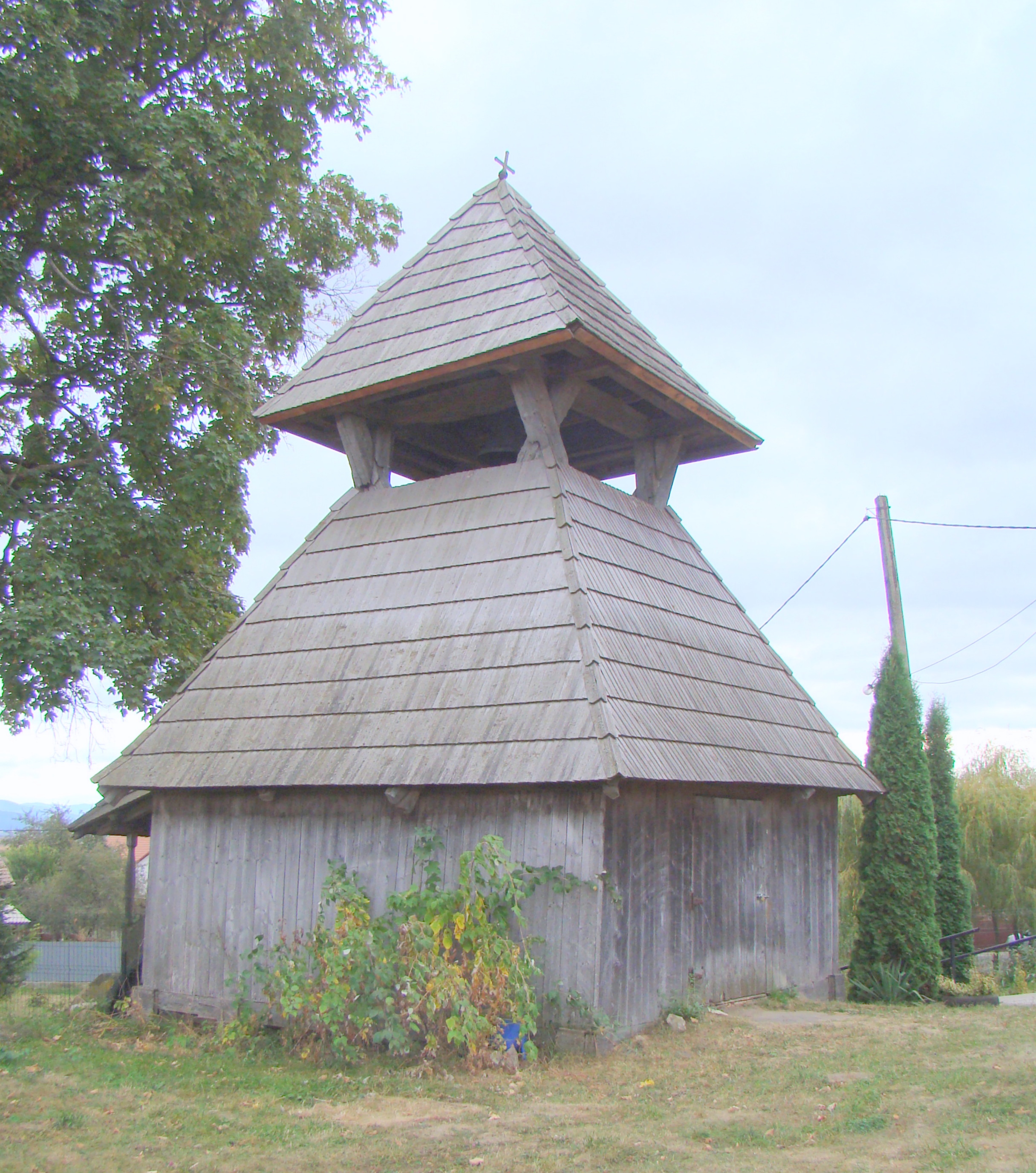 Ansamblul bisericii romano-catolice „A Tuturor Sfinților”, sat Hătuica; comuna Catalina 114 sec. XVI - XIX